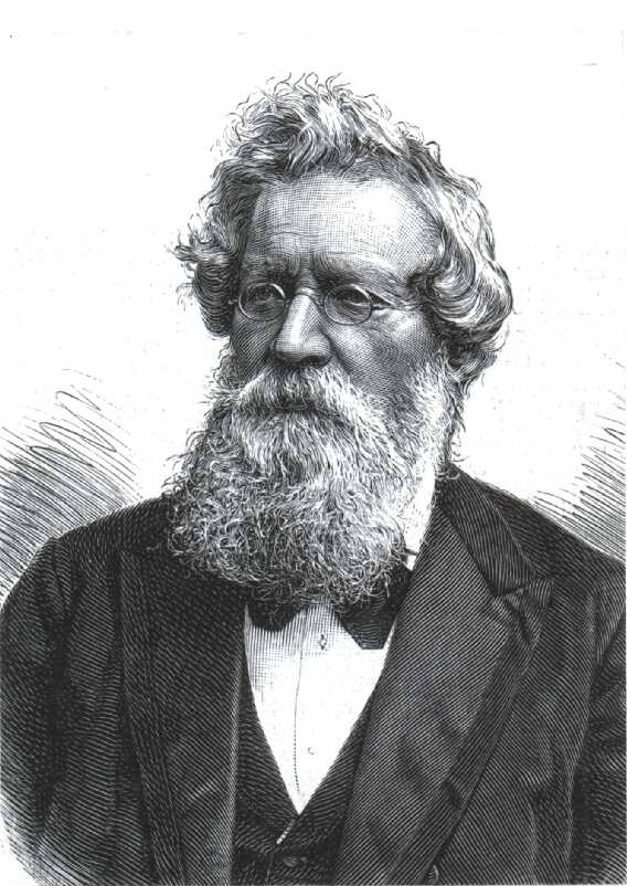 August Wilhelm (von) Hofmann (* 8. April 1818 in Gießen; † 5. Mai 1892 in Berlin)